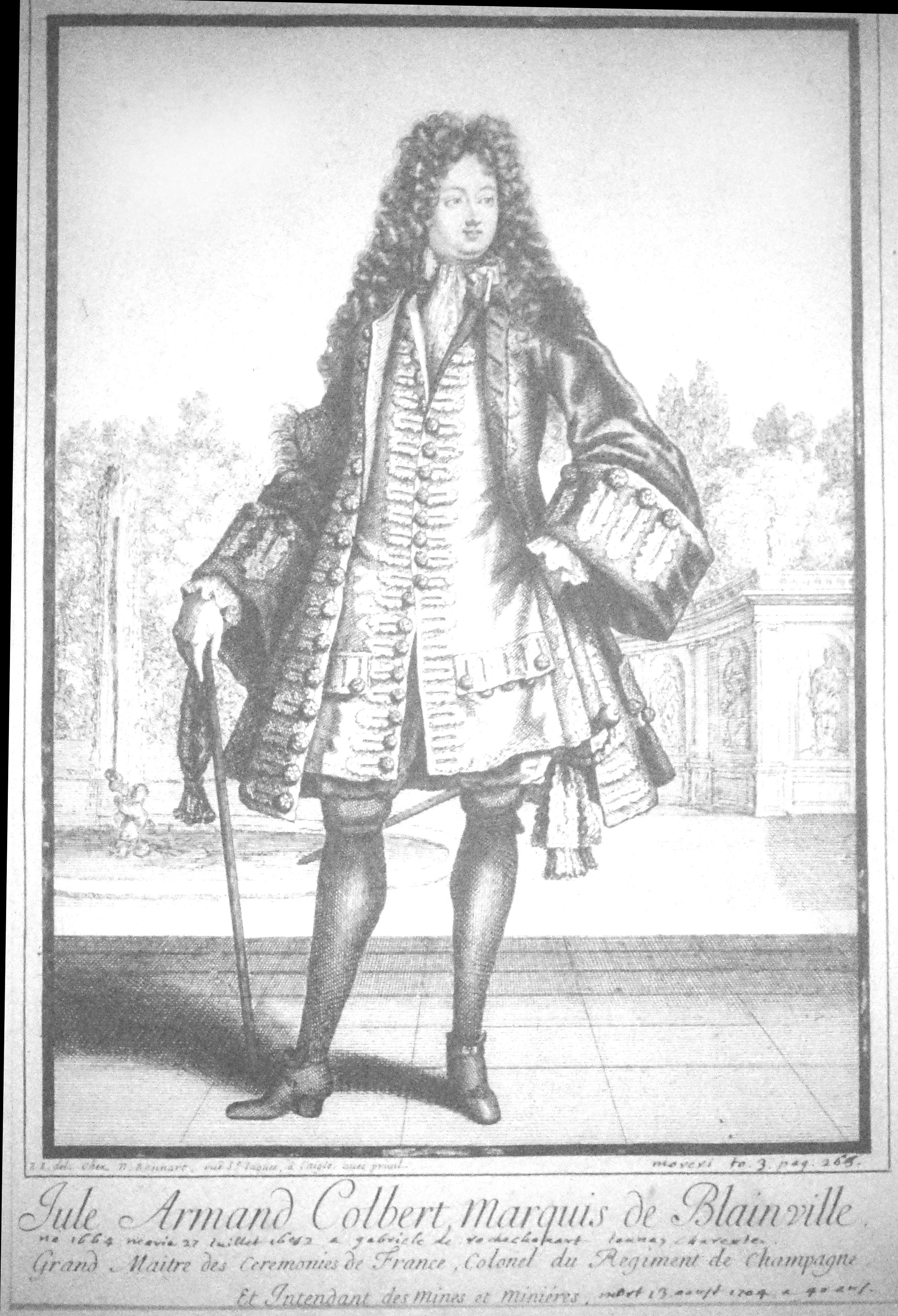 issu du fond iconographique, portrait de rémois.